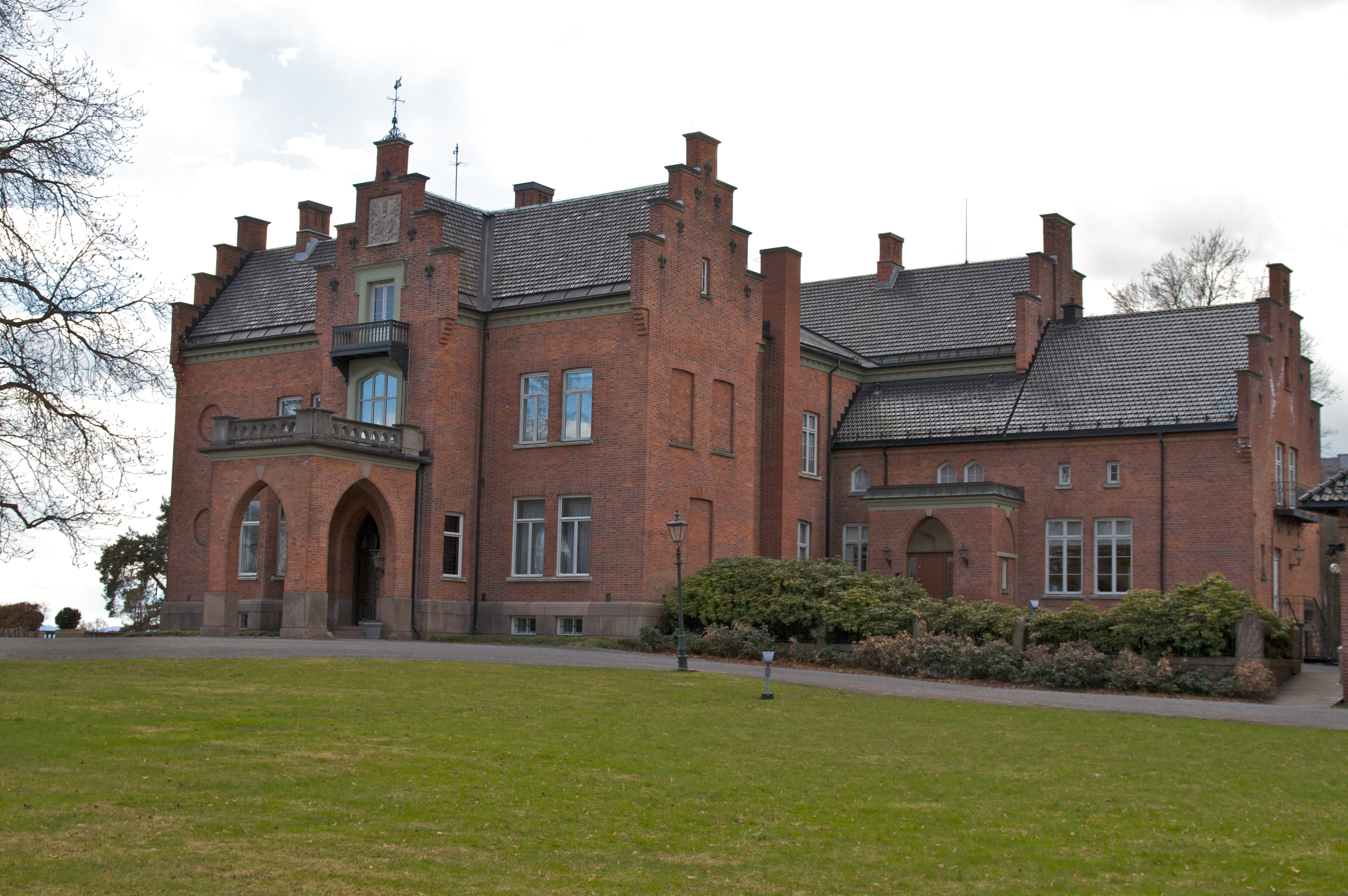 Vækerød gård i Oslo fra 1880. Arkitekt Heinrich Ernst Schirmer (Norsk kunstnerleksikon, side 471)